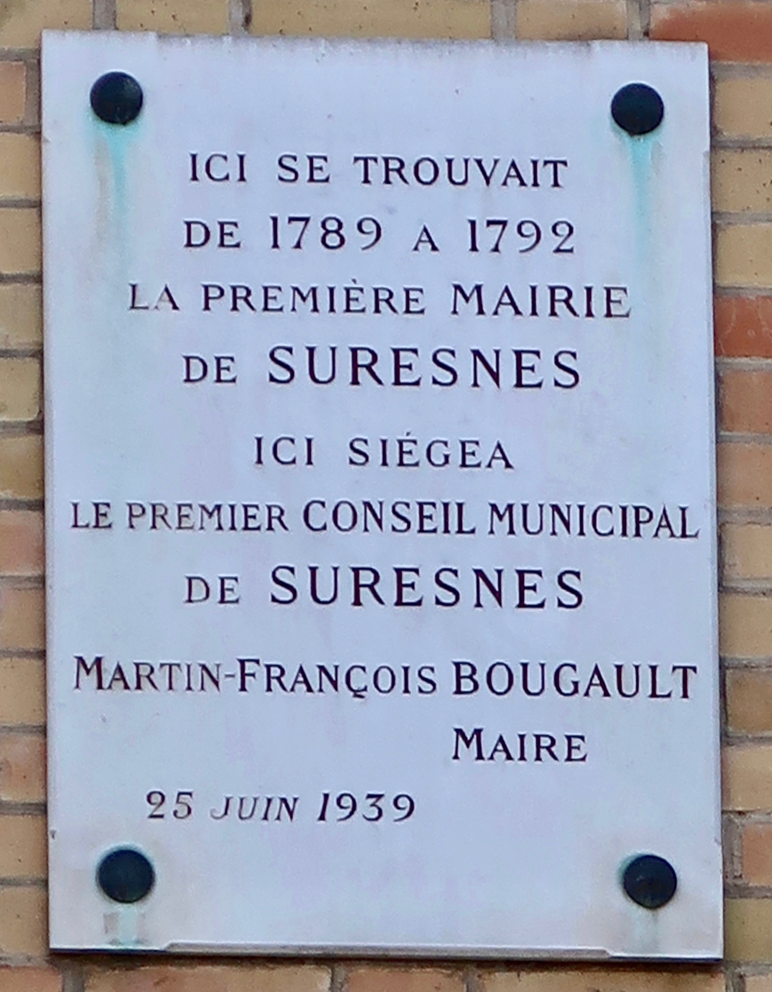 Plaque commémorant le site de l'ancienne mairie de Suresnes, au croisement de la place Henri-IV et de la rue Émile-Zola (Hauts-de-Seine).